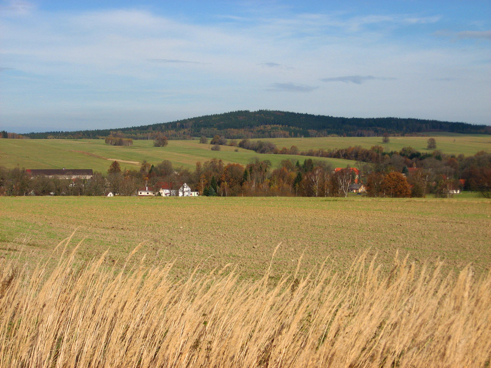 Vyhlídka - pohled od jihu ze silnice II/291